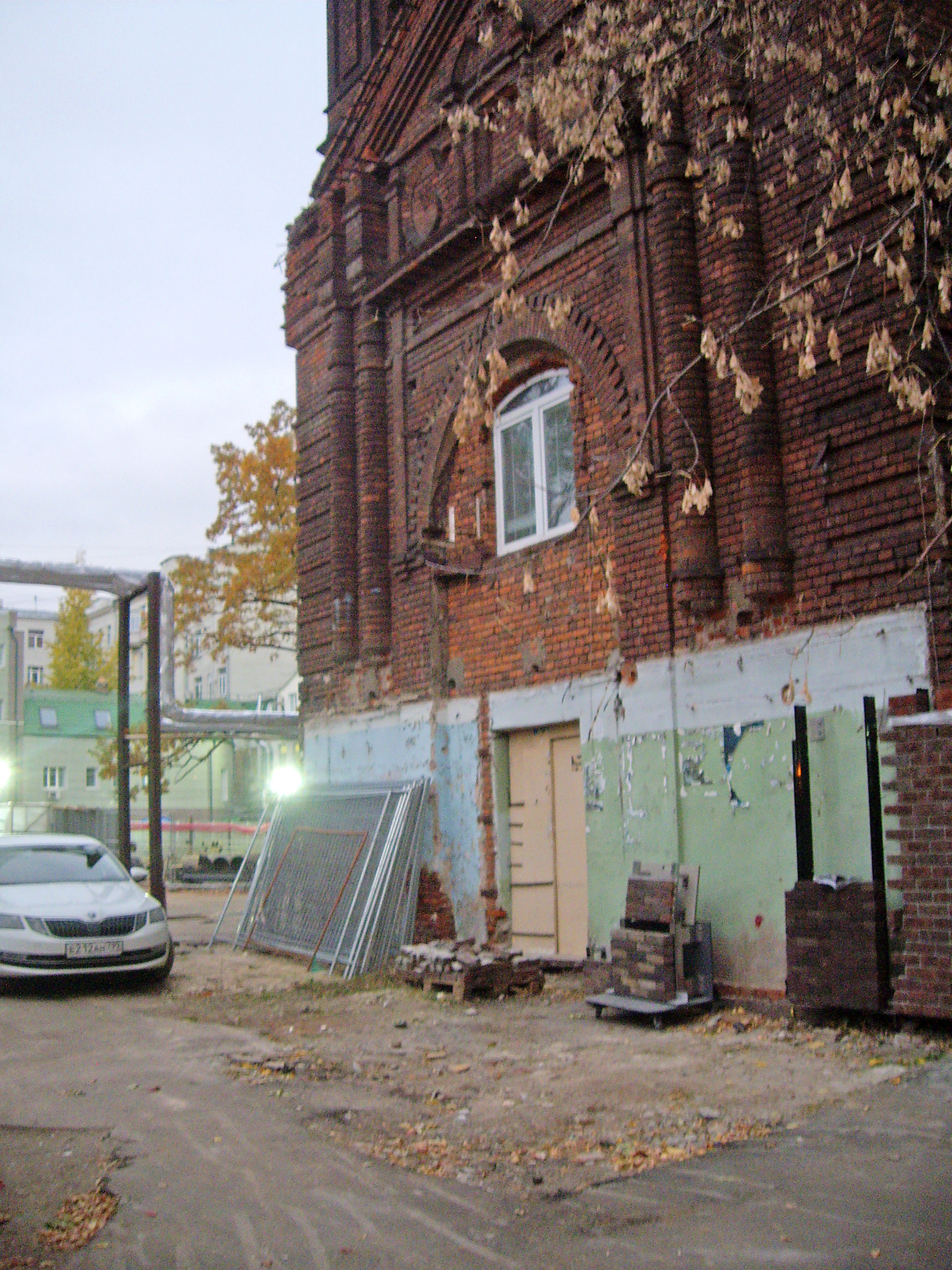 Колокольня храма. Здесь был главный вход